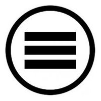 logo